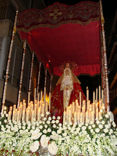 María Santísima del Perdón, perteneciente a la Cofradía del Perdón de Orihuela